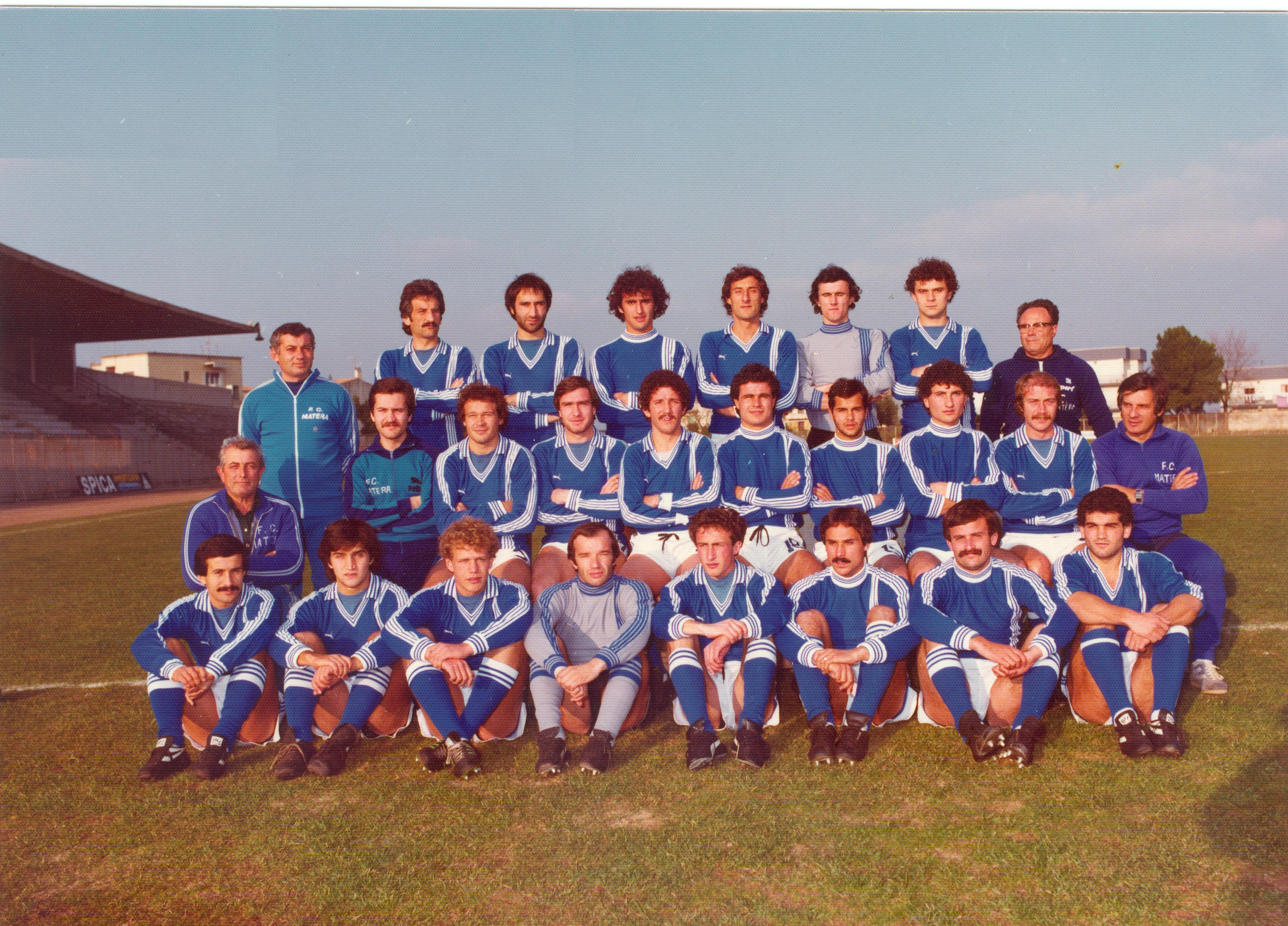 Formazione del Foot Ball Club Matera 1978-1979